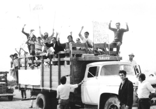 Rebelión de El Chocón